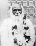 संत गाडगेबाबांनी पंढरपूर येथील धर्मशाळा डॉ. बाबासाहेब आंबेडकरांना अर्पण केली. त्यावेळी डावीकडून कर्मवीर भाऊराव पाटिल, संत गाडगेबाबा व डॉ. बाबासाहेब आंबेडकर. (१४ जुलै १९४९)